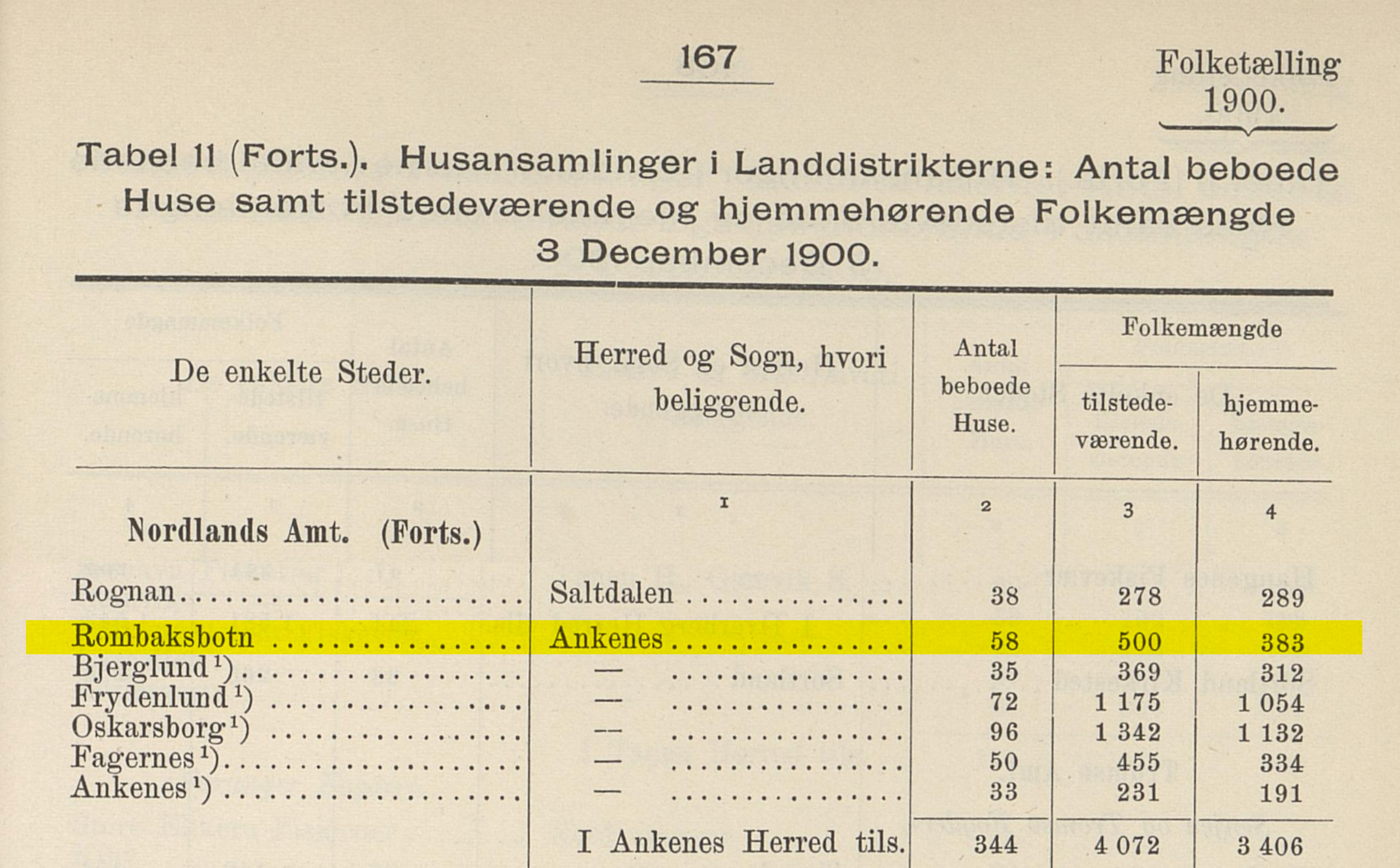 Fra Folketællingen i Kongeriget Norge 3. December 1900 som ble avholdt i anleggstiden før befolkningen i Rombaksbotn flyttet til Narvik etter fullføringen av Ofotbanen.